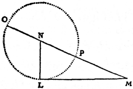 Exemple de la Geometria de Descartes